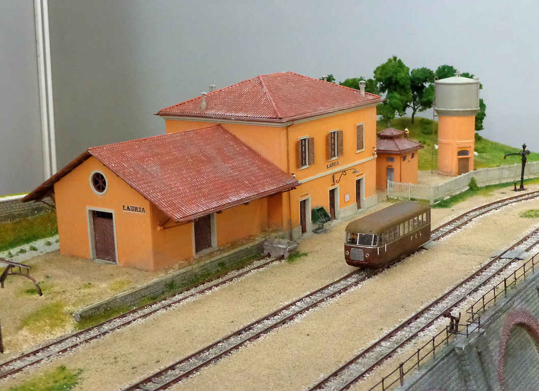 Modello in scala H0 della stazione ferroviaria di Lauria, esposto allo stand della ditta Os.Kar durante la fiera Hobby Model Expo del 2012, per presentare il modello dell'automotrice "Emmina" delle FCL.